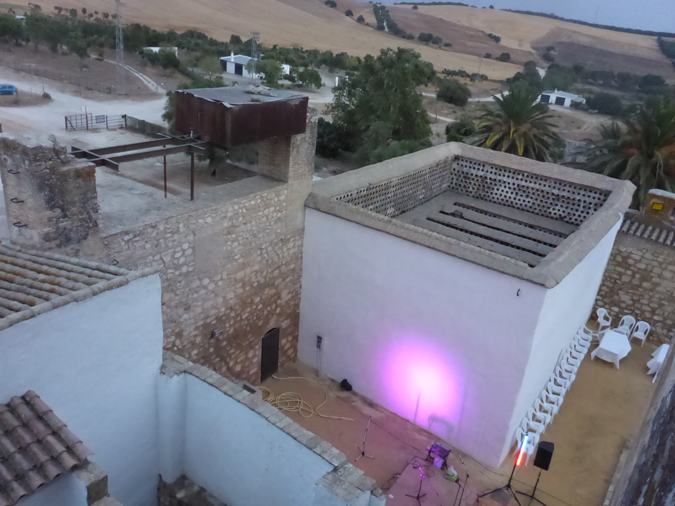 2ª noche medieval en el Castillo de Gigonza